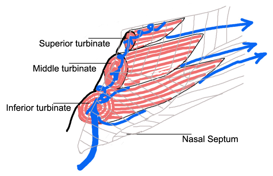 Right nasal airway passage